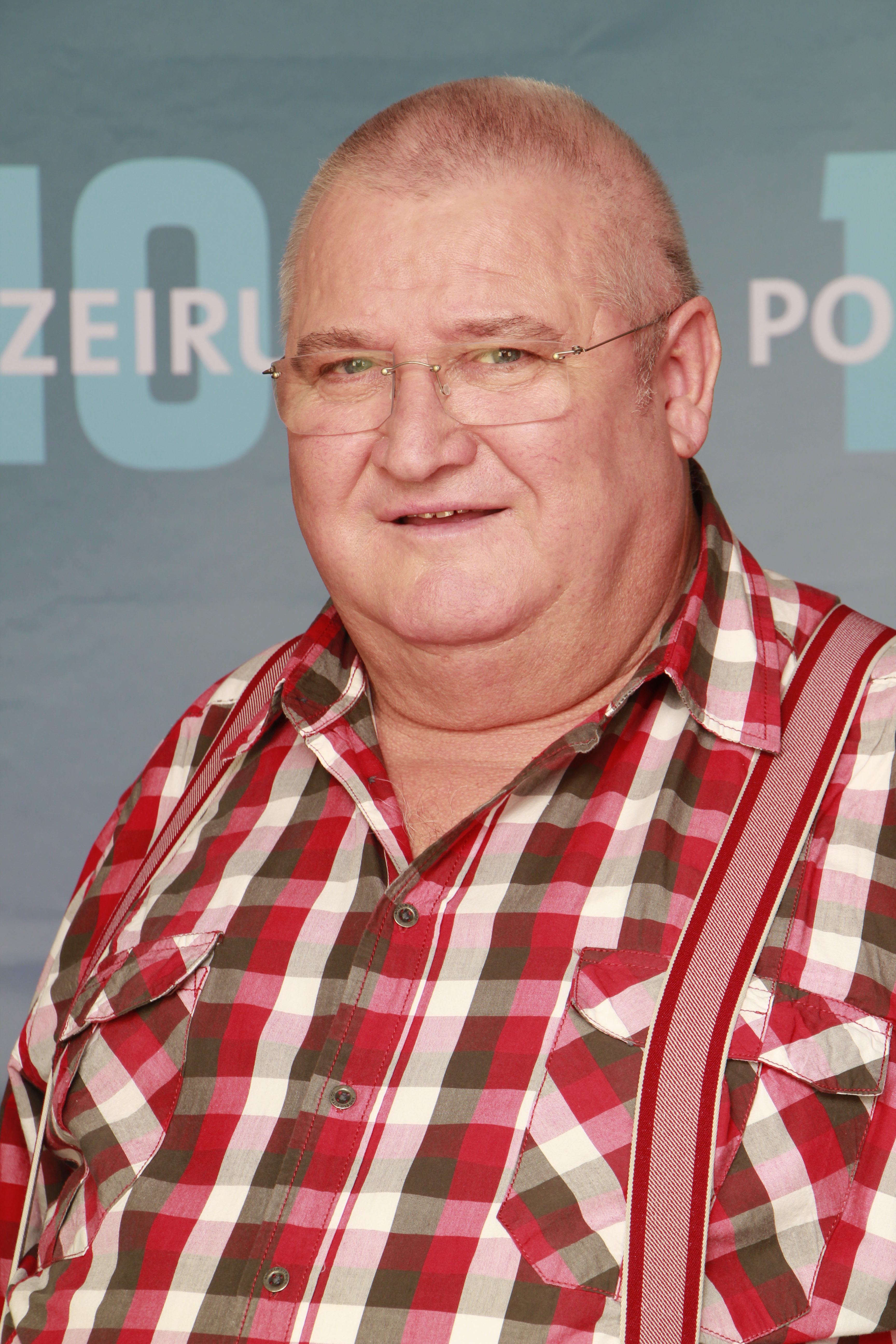 Horst Krause (* 18. Dezember 1941 in Bönhof, Westpreußen) ist ein deutscher Theater- und Filmschauspieler